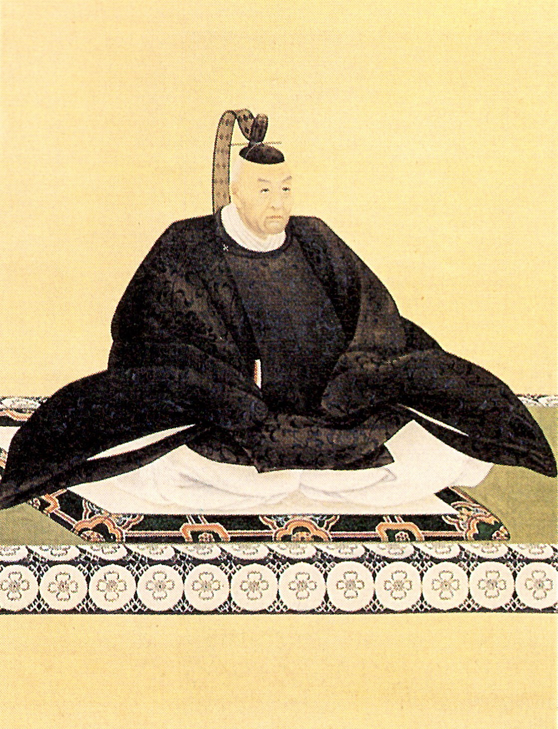 二条斉敬の肖像。